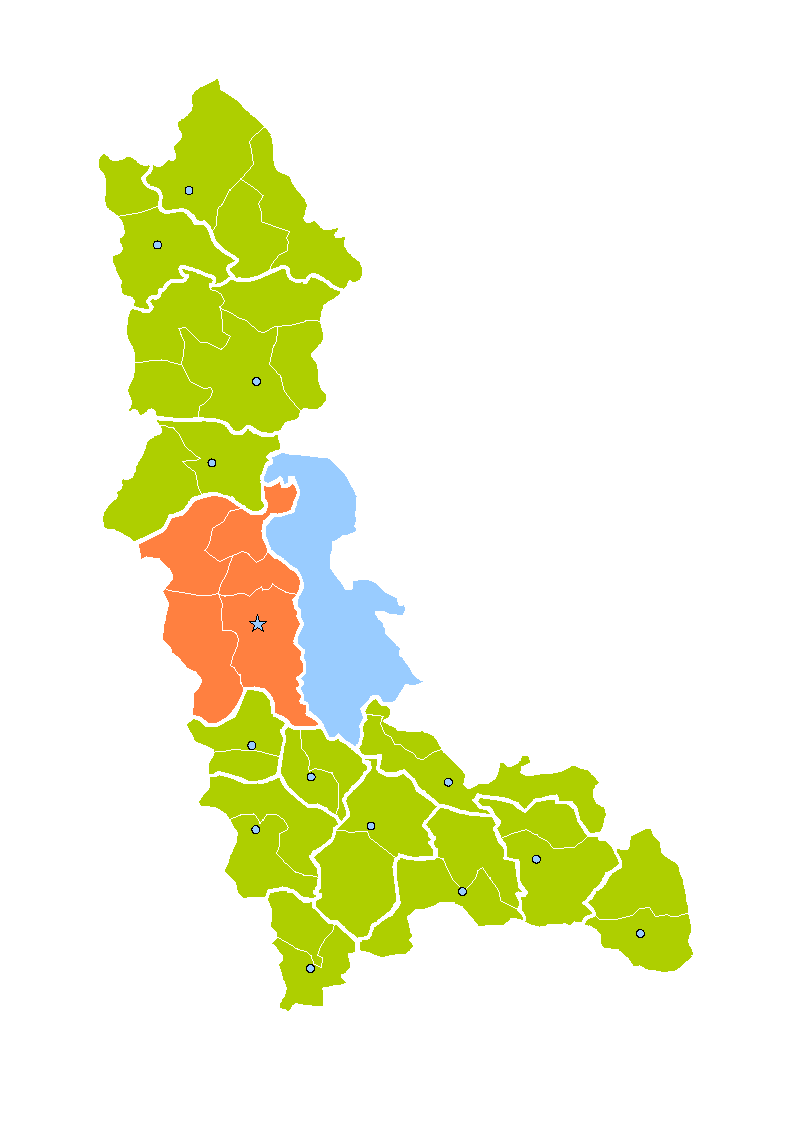 شهرستان ارومیه